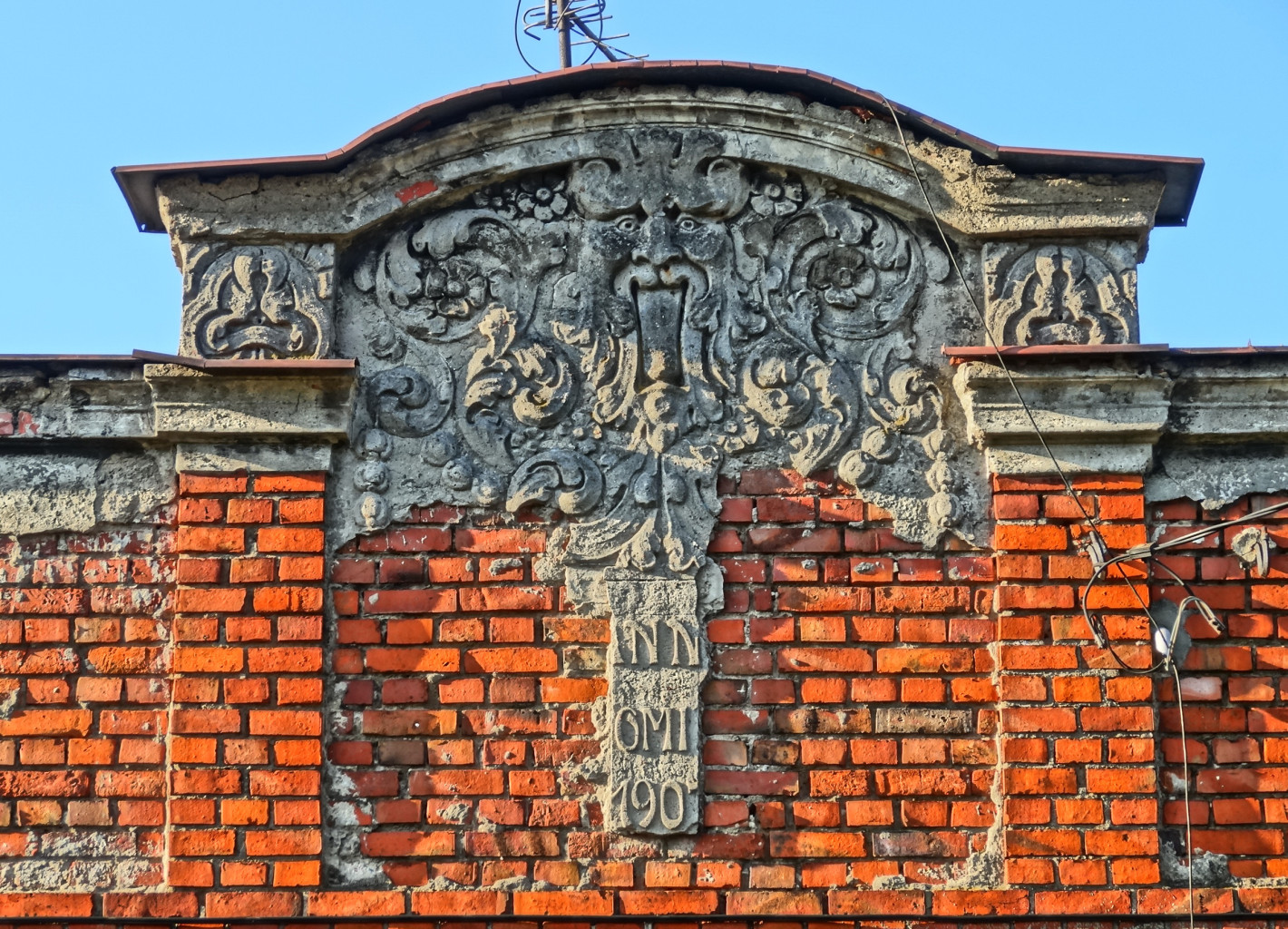 Dom ul. Na Wzgórzu 10 w Bydgoszczy (osiedle Wilczak)